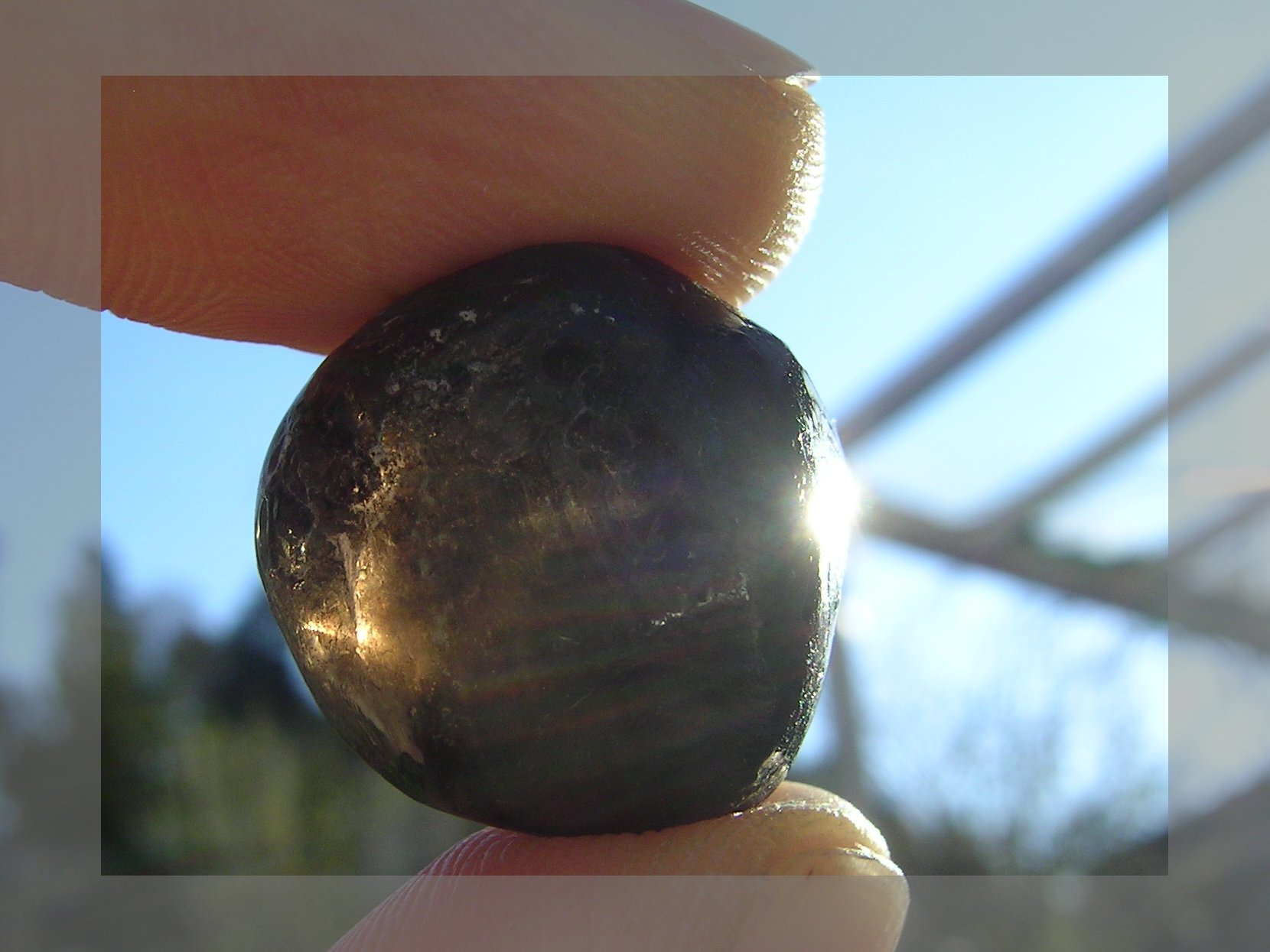 Apachenträne (Obsidian) im Gegenlicht: Durchscheinend